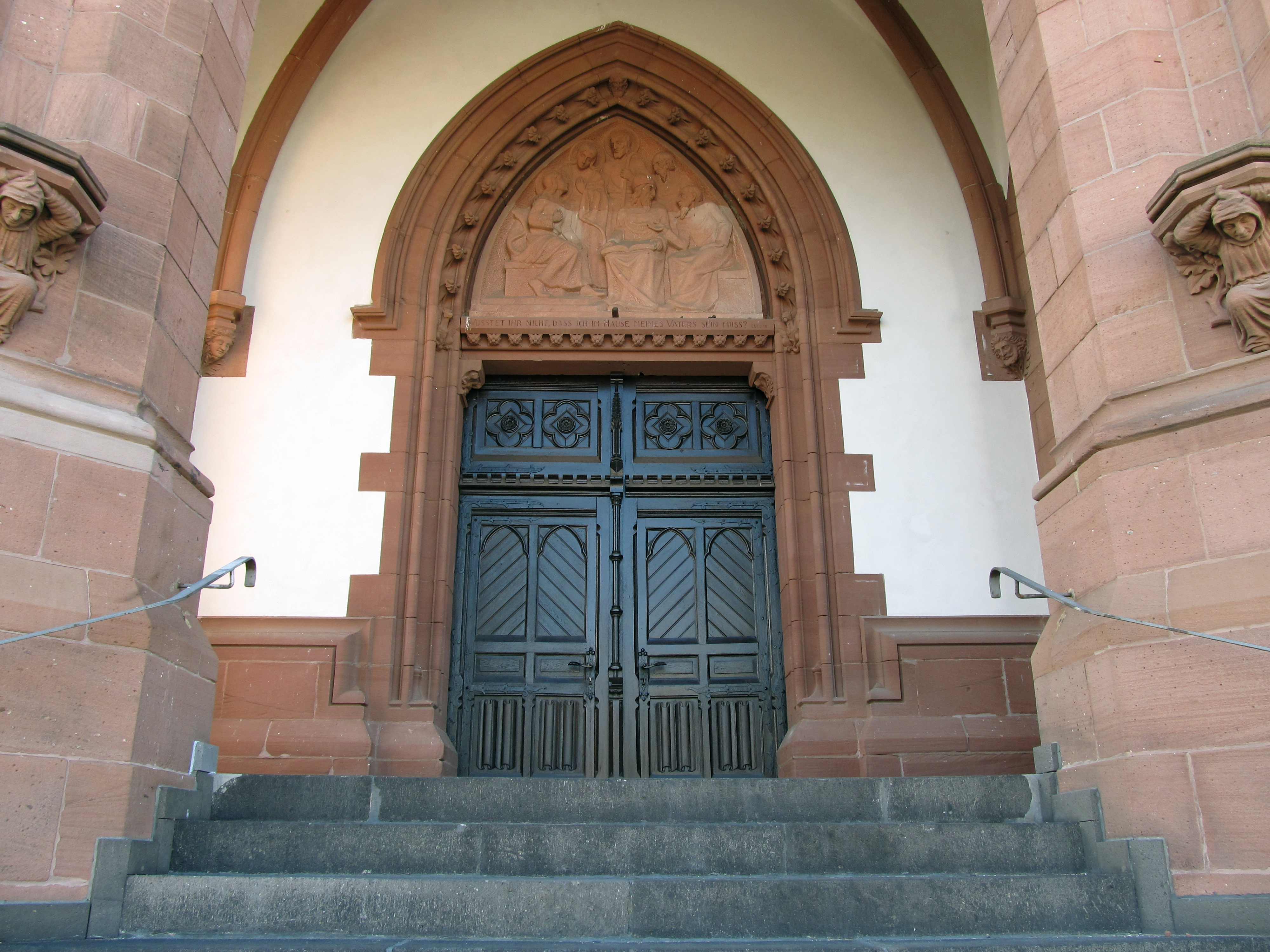 Hauptportal der Kirche St. Josef in St. Ingbert, Saarland